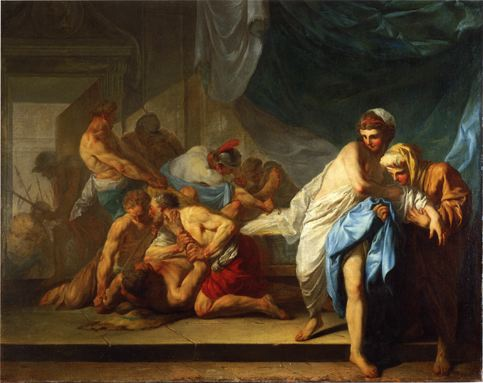 Jean-François Amand, Samson livré aux philistins par Dalila, 1755, Mayence, Landesmuseum